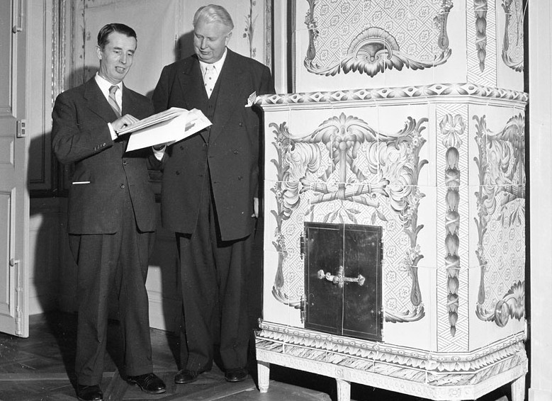 Gösta Selling och Stadsfullmäktiges ordförande Carl Albert Andersson vid en av Sturehovs alla Mariebergskakelugnar